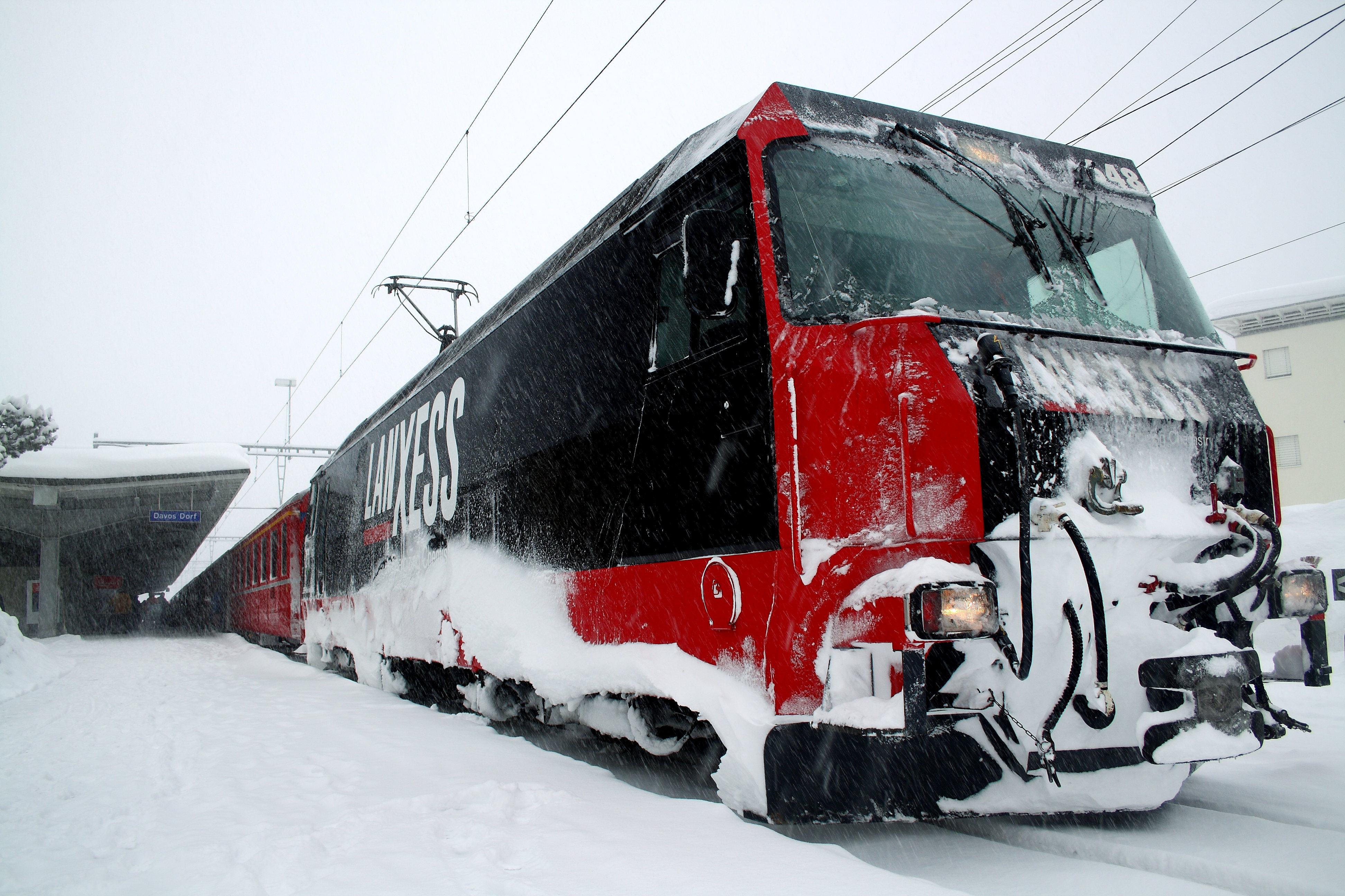 Zug der Rhätischen Bahn mit Lok der Reihe Ge 4/4 III im Bahnhof Davos Dorf nach massiven Schneefällen.